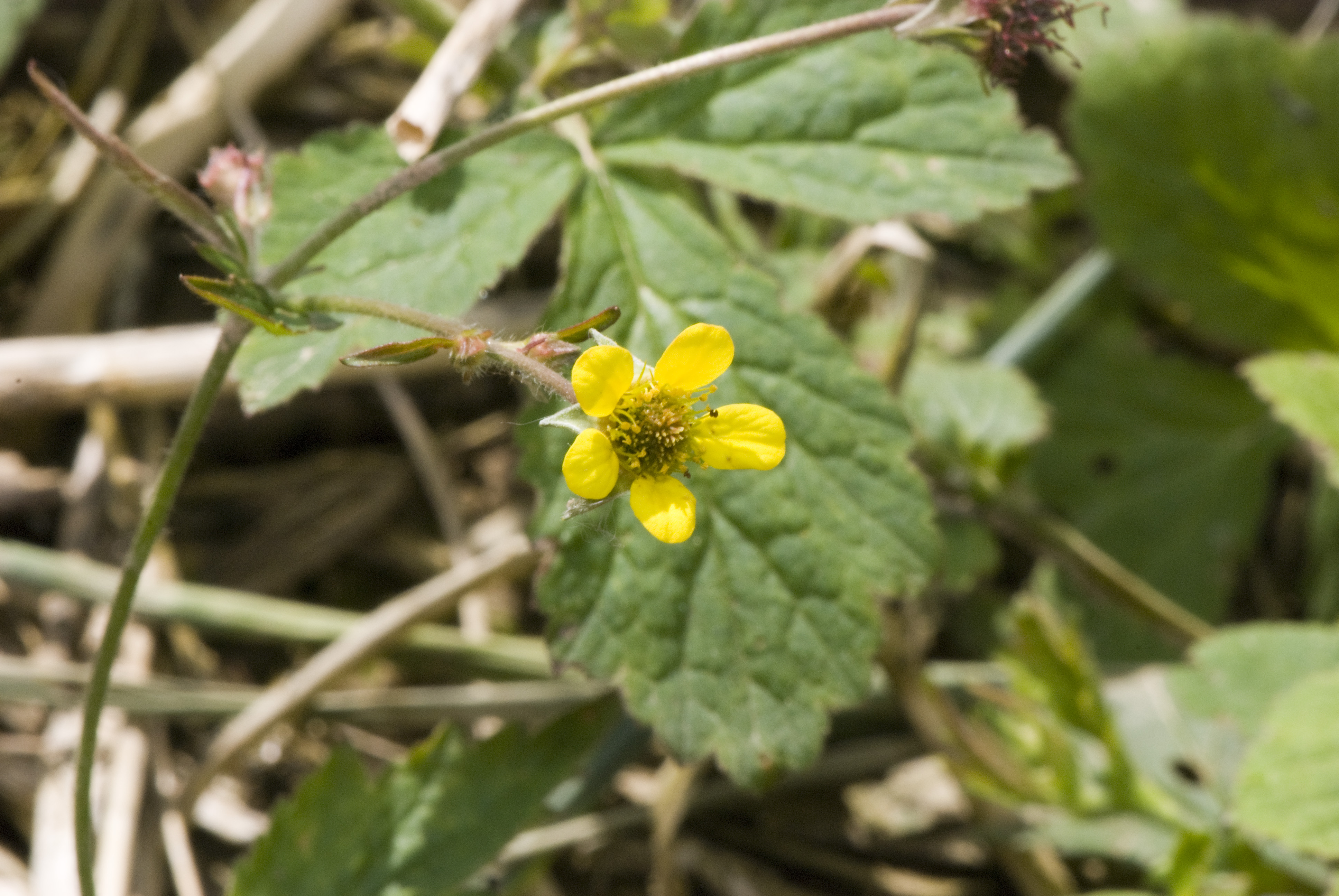 Geum urbanum Ancien camp militaire Saint-Fuscien à Dury (Somme), France